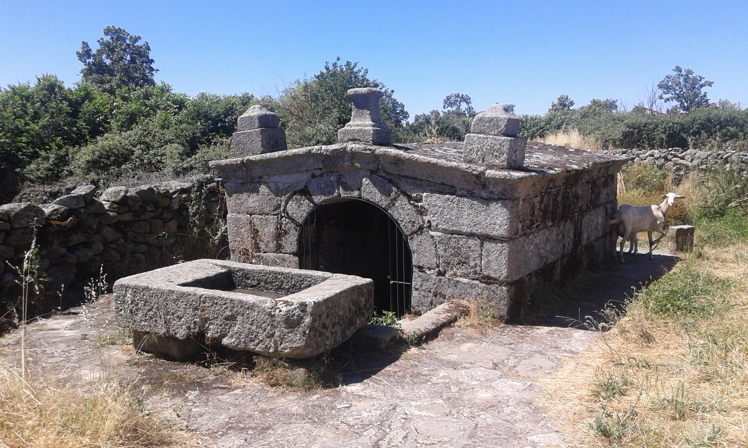 Descubrí por casualidad esta fuente yendo por la carretera que va desde Miranda de Douro en dirección a Zamora.